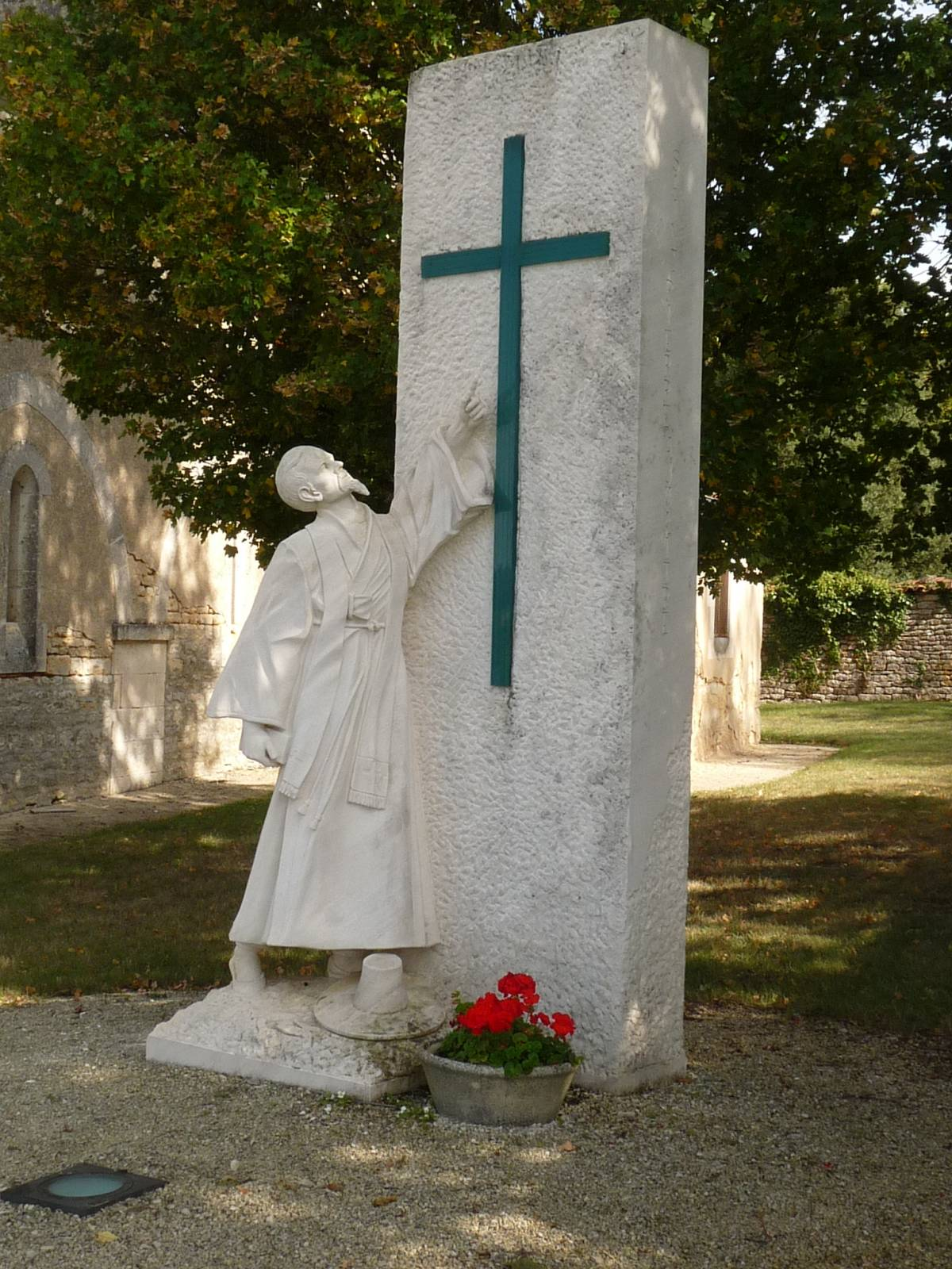 statue de Pierre Aumaître, prêtre martyr en Corée, Aizecq, Charente, France